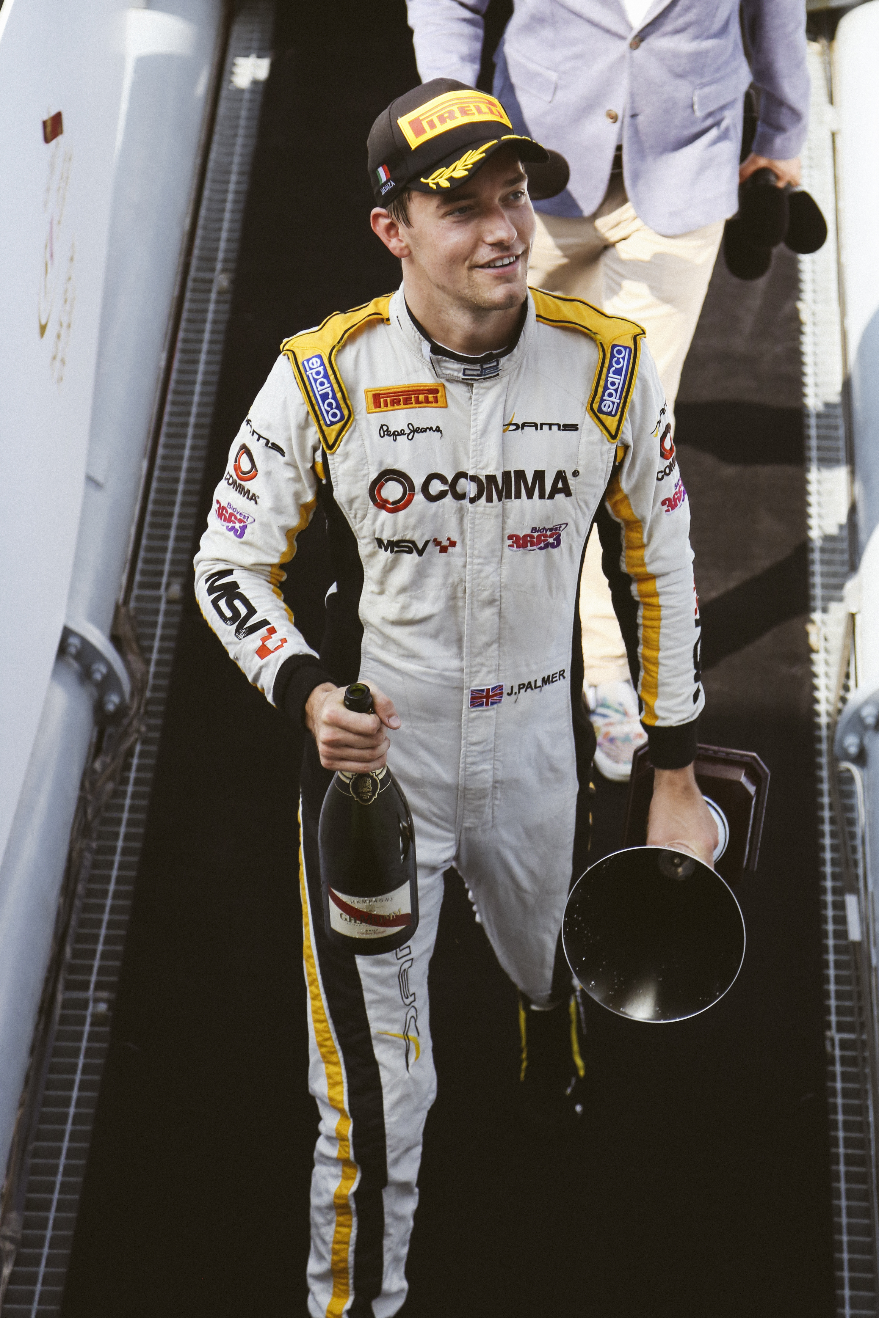 GP MONZA 2014